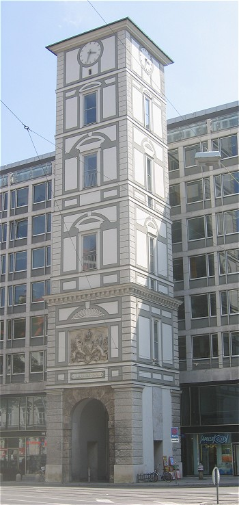 Renaissanceturm der im Zweiten Weltkrieg zerstörten Herzog-Max-Burg, München, Pacellistraße 5